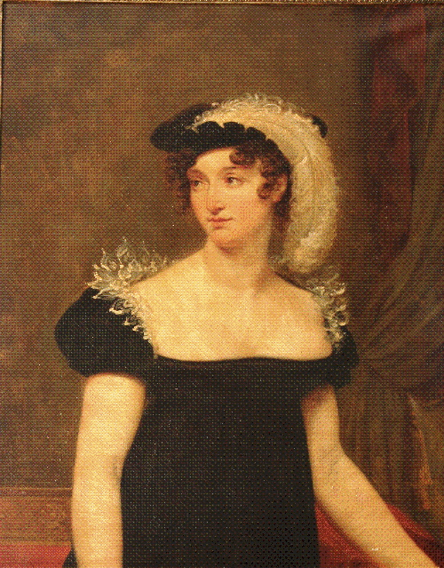 Josephine Berthier, née d'Aiguillon